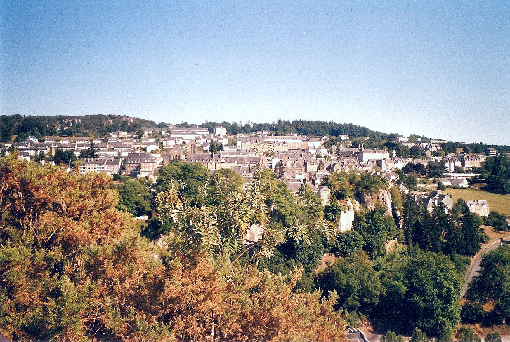 Photographie de Mortain